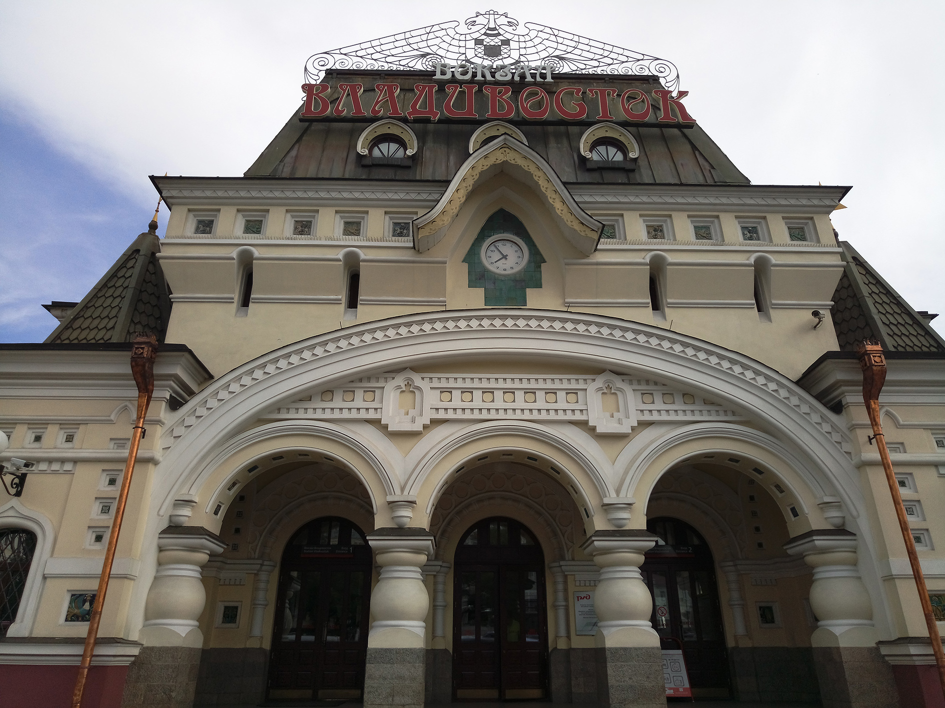 Здание железнодорожного вокзала, связанное с революционными событиями 1905-1906 гг. и борьбой в годы Гражданской войны и интервенции 1917-1922 гг.: улица Алеутская, 2 (площадь Вокзальная), Владивосток, Приморский край